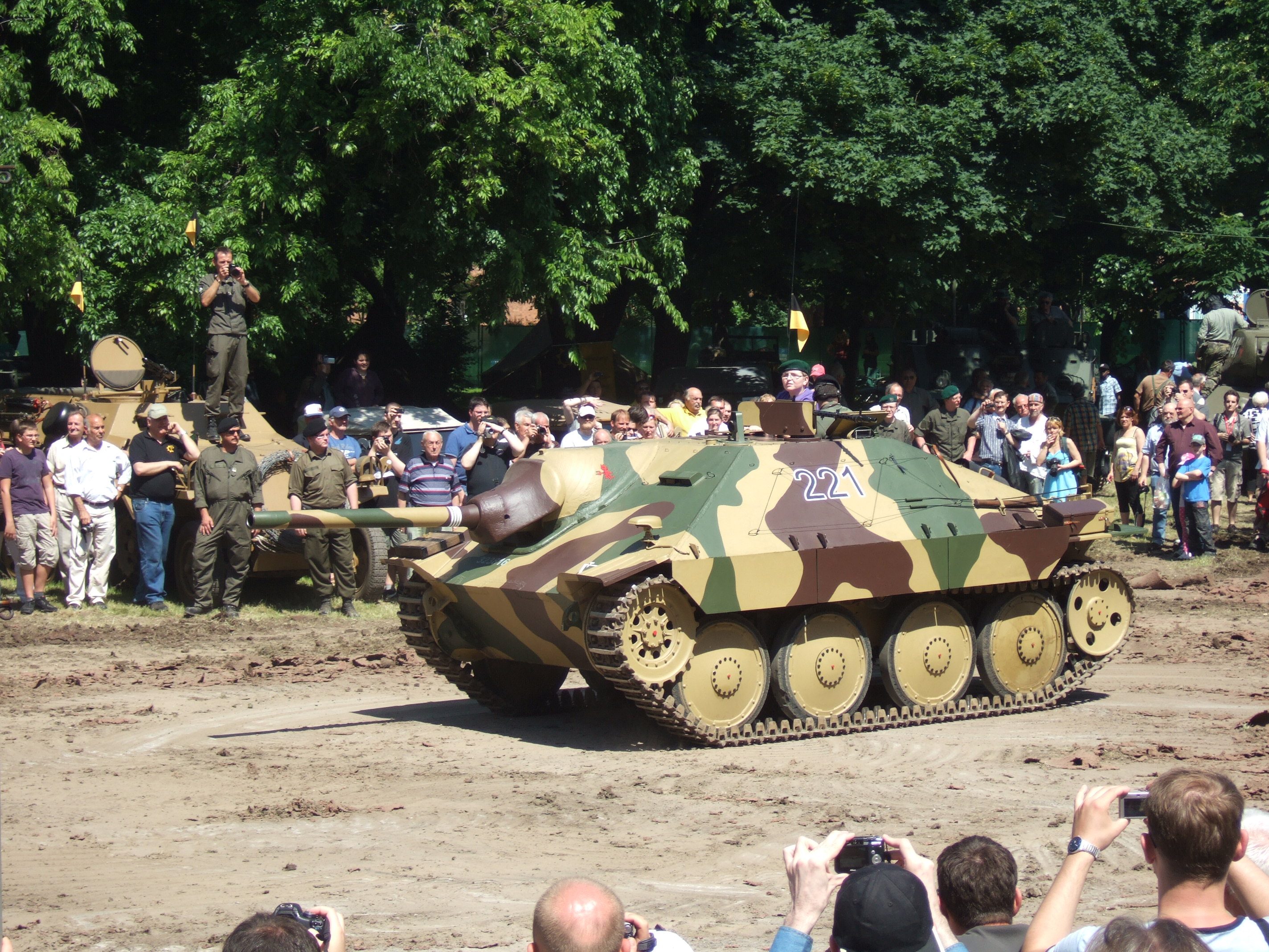 Fahrbereiter Jagdpanzer 38 „Hetzer“ (Schweizer G-13) des Heeresgeschichtlichen Museums (HGM) bei einer Vorführung der Veranstaltung „Auf Rädern und Ketten“ im HGM.